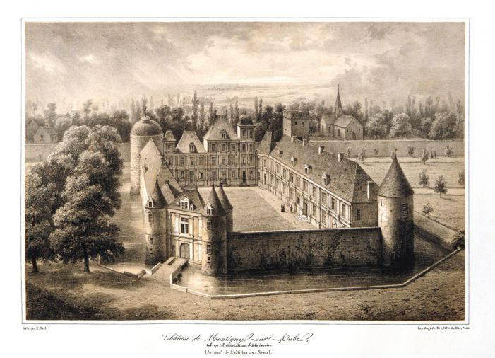 Gravure du château de Montigny-sur-Aube avant l'incendie de 1817.